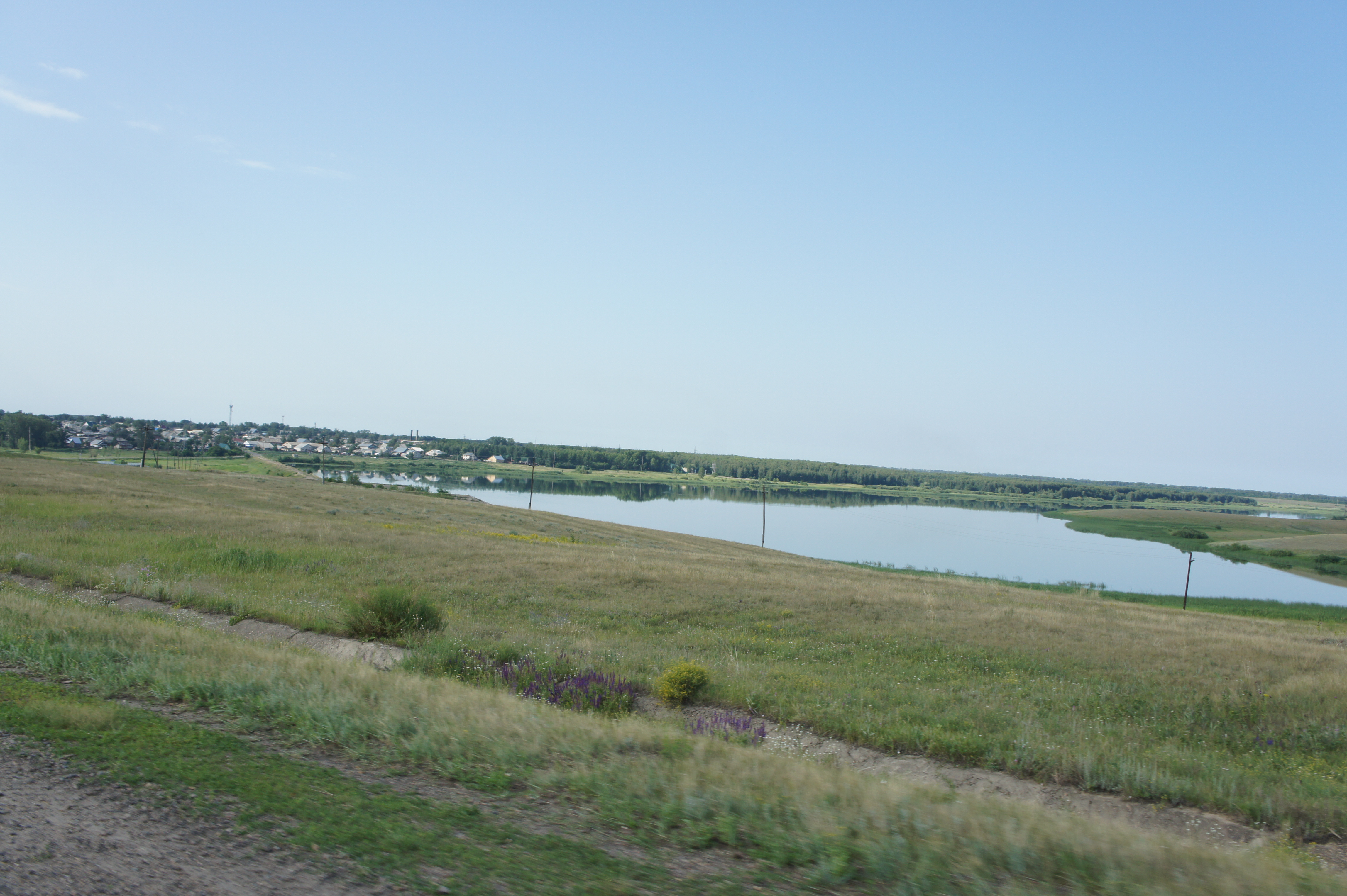 село Шипуново, Алтайский край